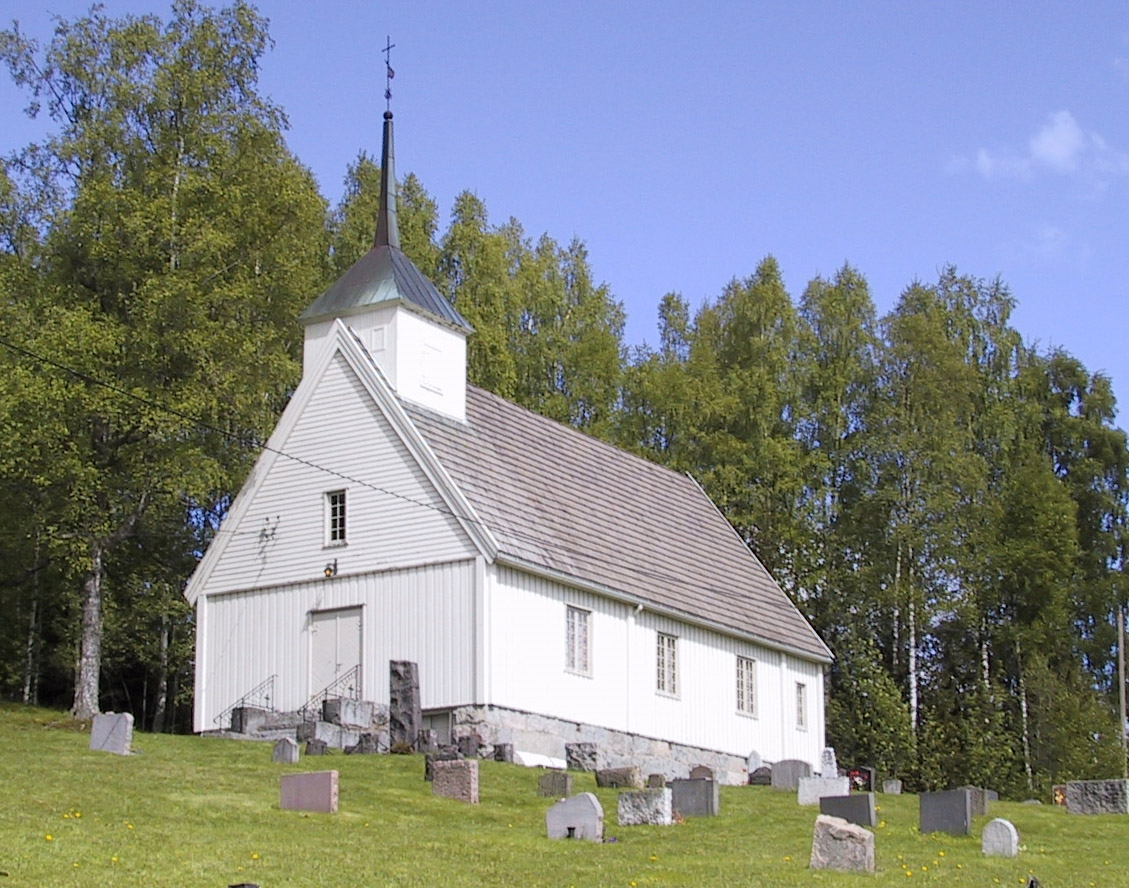 Trøftskogen kapell, Nord-Odal, Norway